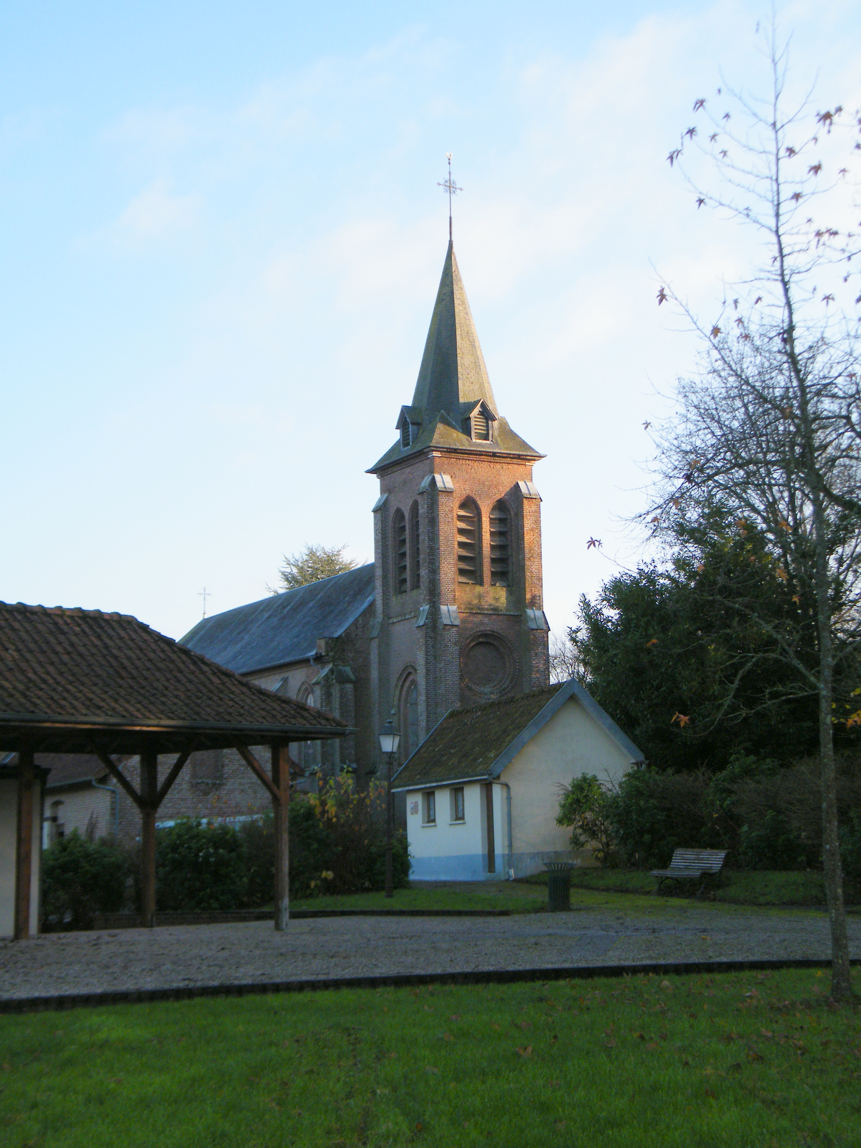 Saint-Martin, vue générale depuis le parc de jeux.